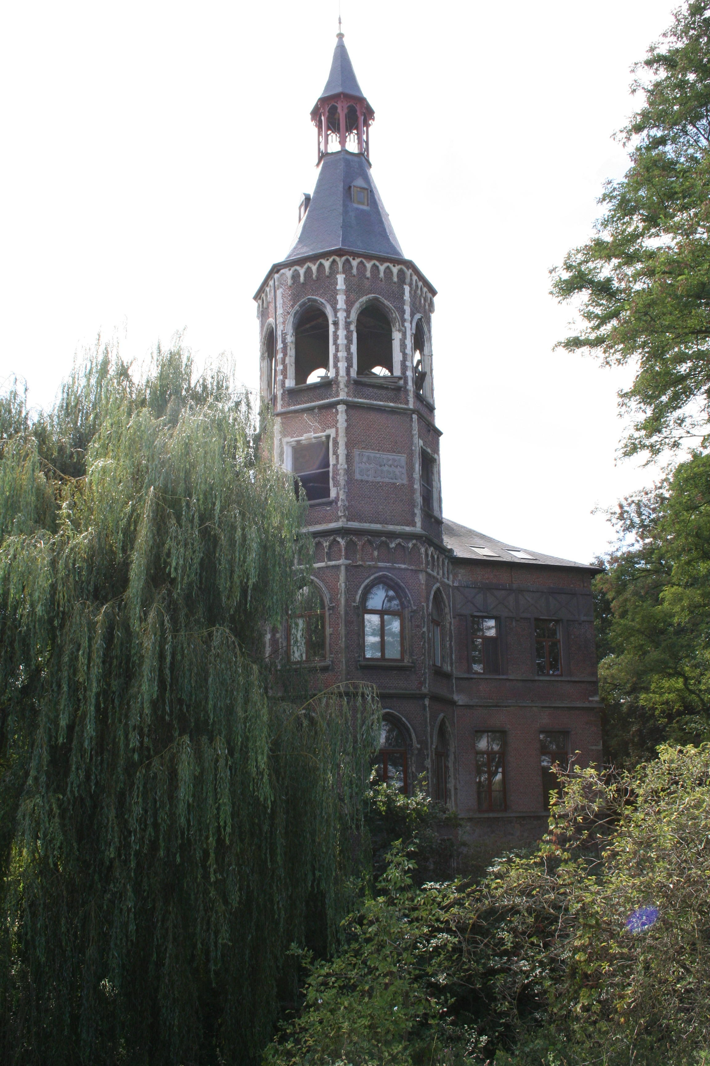 Toren van Kasteel De Bocht gezien vanaf de Rupeldijk (zijde Heindonk)